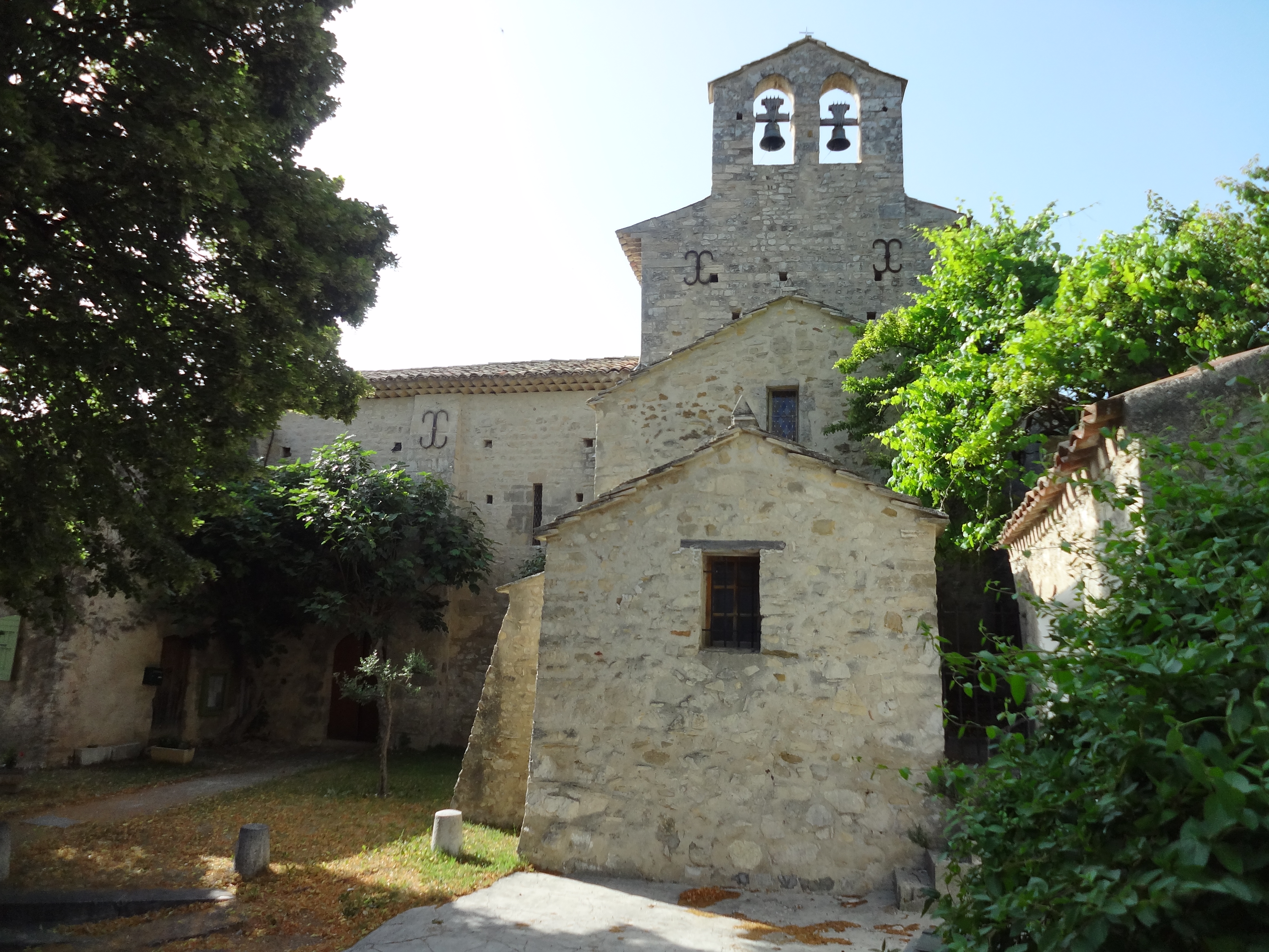 Église Saint-Martin de Saint-Martin-les-Eaux (Alpes-de-Haute-Provence), mur est avec clocher mur